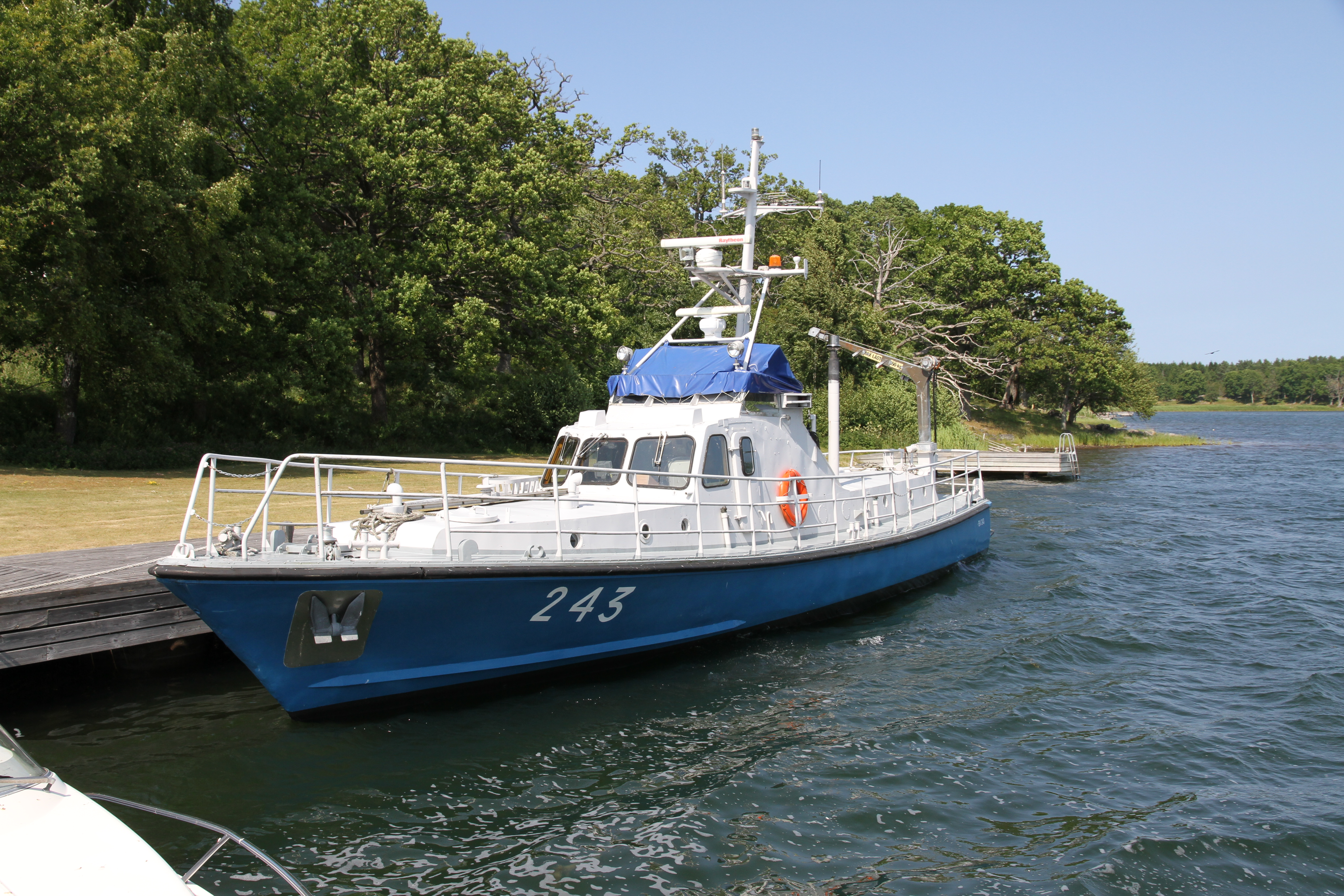 Fd KBV 234 (Tv 243) i Breviksnäs, Gryt 9 juli 2013. Signal SCOU. Byggd 1964 vid Djupviks varv AB, Tjörn